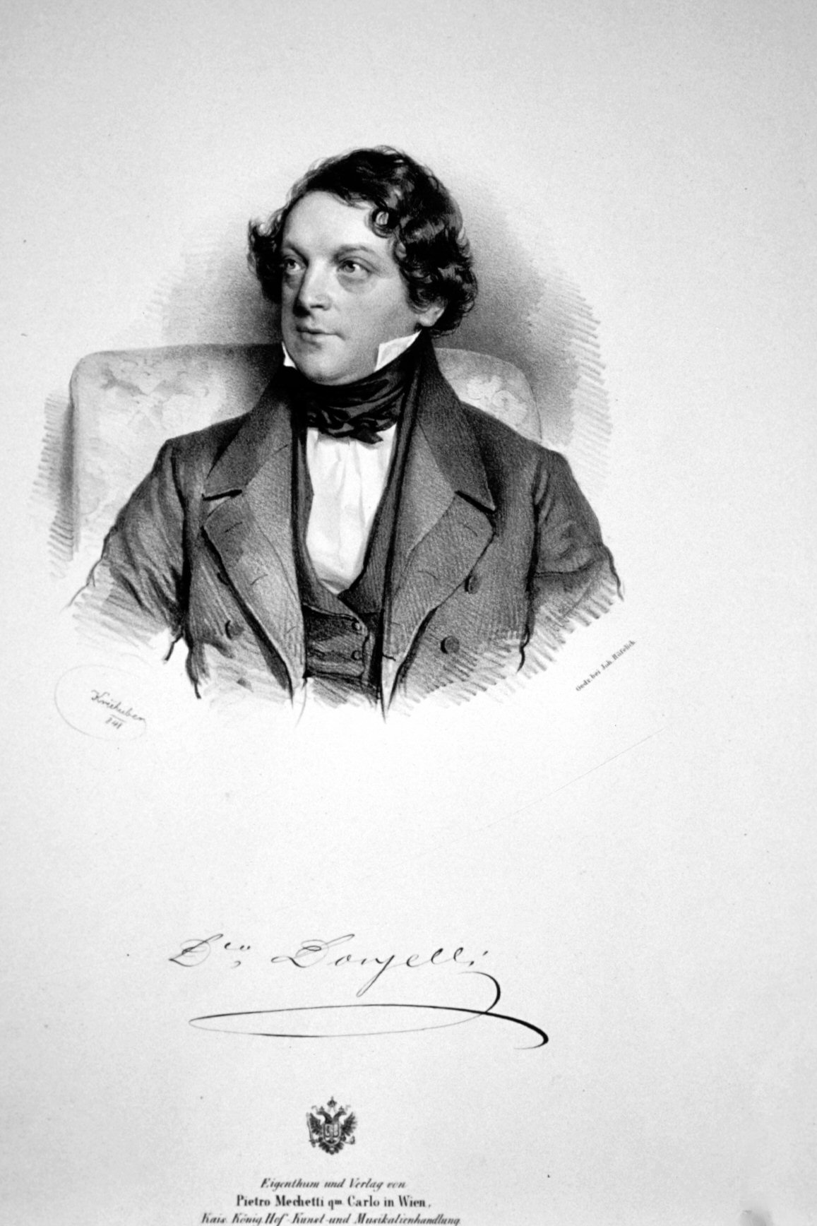 Domenico Donzelli (1791-1873) war ein italienischer Opernsänger (Tenor).